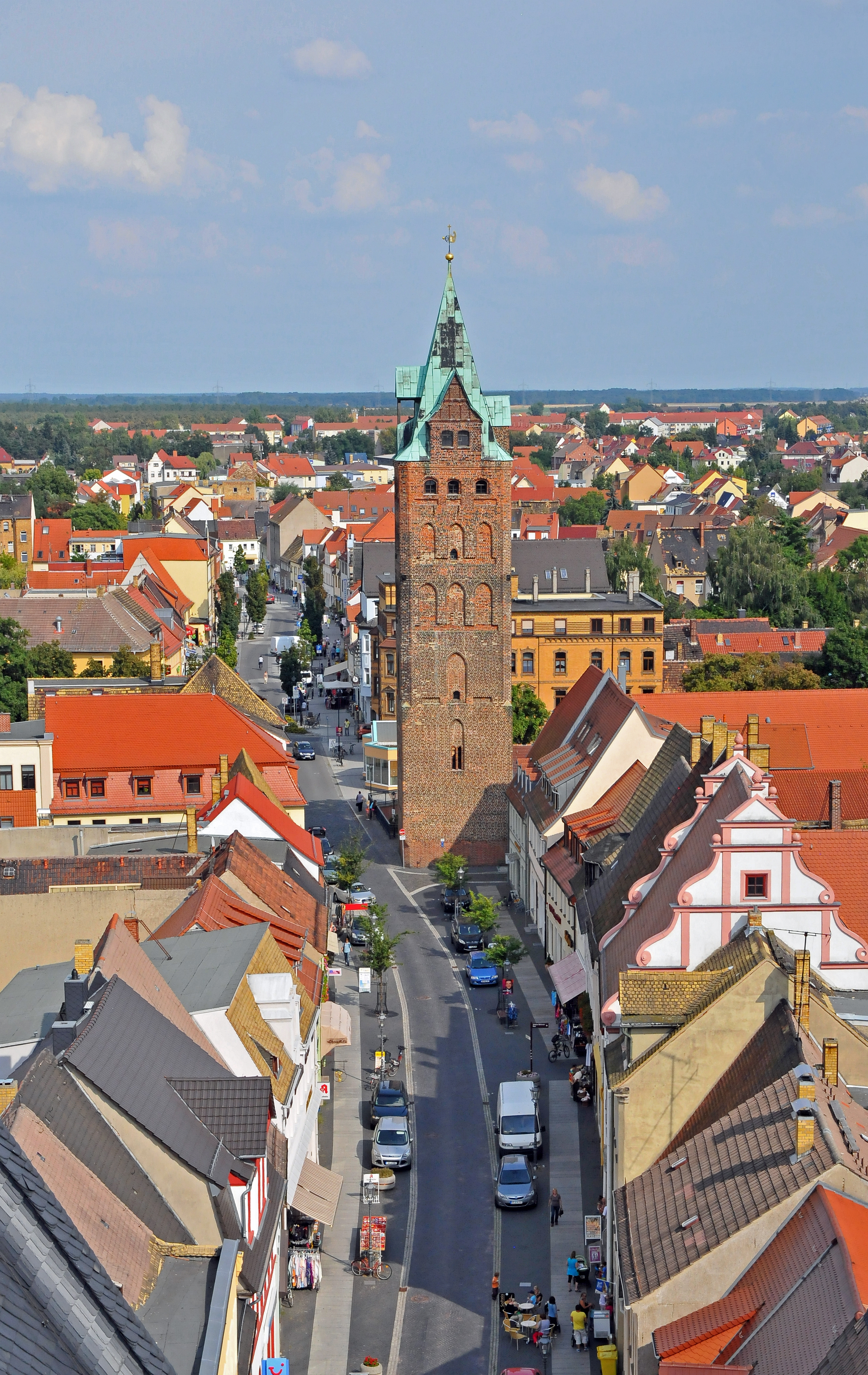 Delitzscher Innenstadt - Breite Straße und Breiter Turm